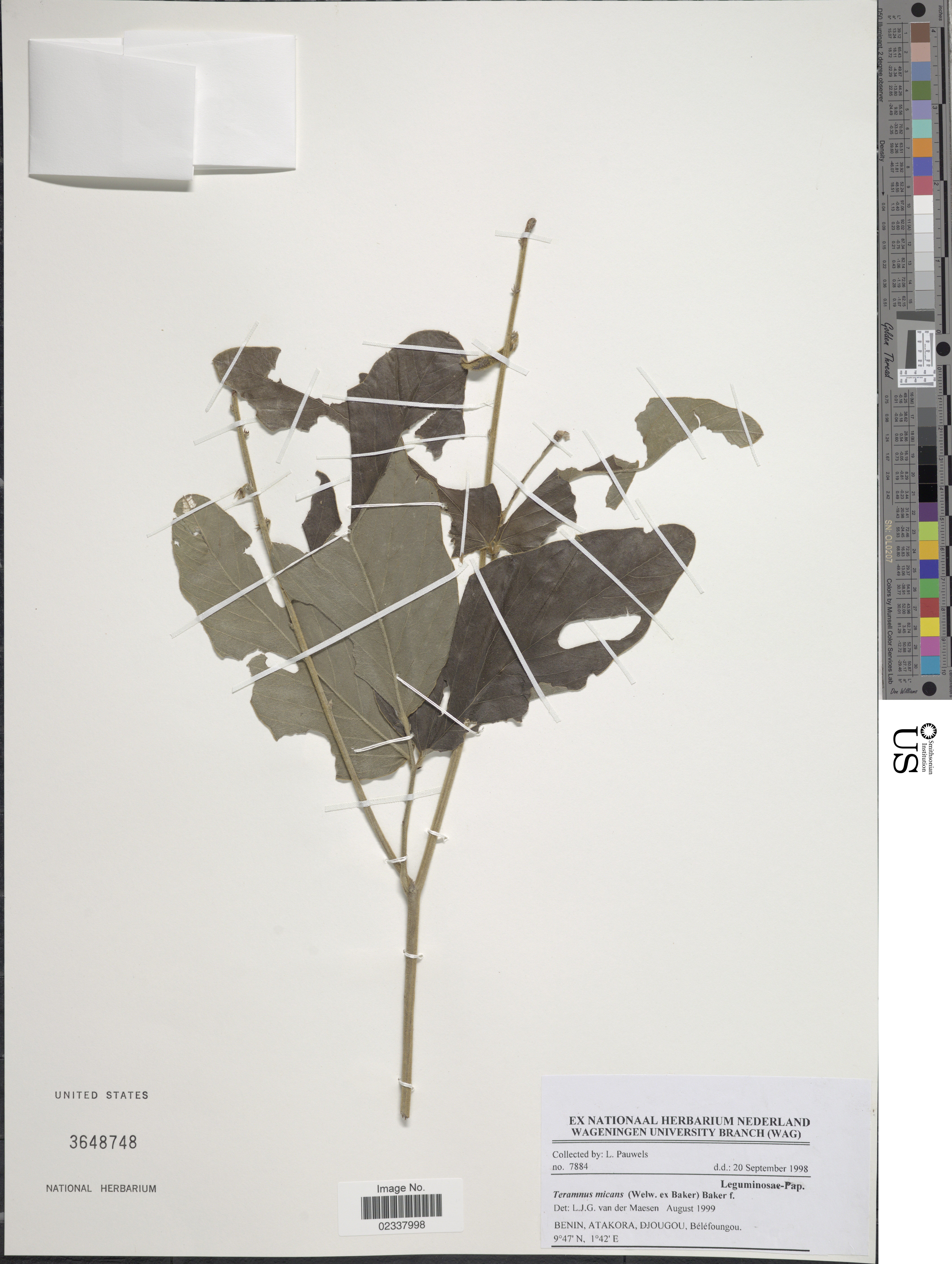 Teramnus micans (Welw. ex Baker) Baker f. Object Details Biogeographical Region 22 - West Tropical Africa Collector L. Pauwels Record Last Modified 3 Nov 2017 Specimen Count 1 Collection Date 20 Sep 1998 Barcode 02337998 USNM Number 3648748 Place Djougou, Béléfoungou, Atakora, Benin, Africa Published Name Teramnus micans (Welw. ex Baker) Baker f. Taxonomy Plantae Dicotyledonae Rosales Fabaceae Faboideae NMNH - Botany Dept. Record ID nmnhbotany_13631216 Usage of Metadata (Object Detail Text) CC0 GUID (Link to Original Record)